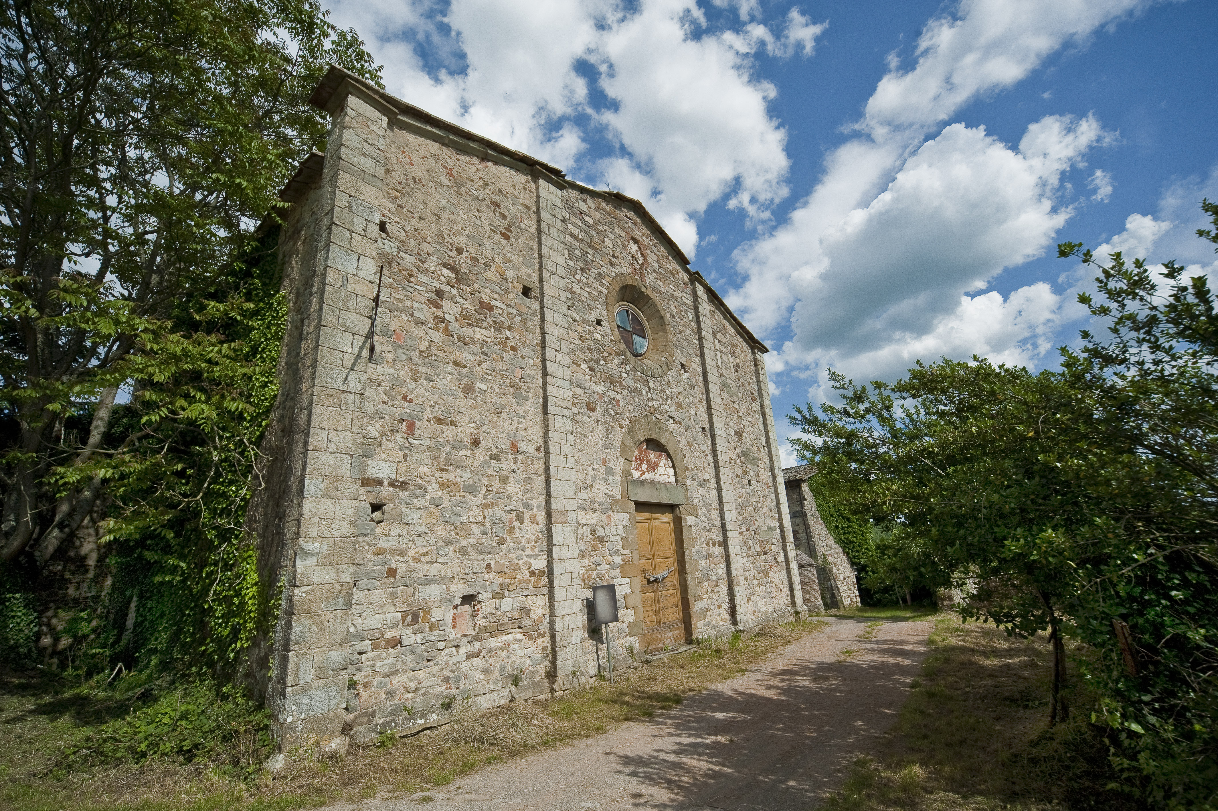 Chiesa di san Pietro in Avenano, Facciata - Gaiole in Chianti